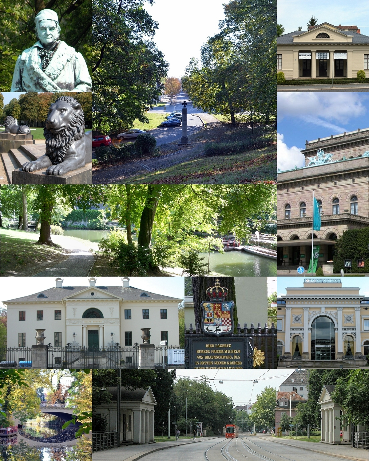 Der Braunschweiger Wallring. Die Collage zeigt: Das Gaußdenkmal, die Schadow-Löwen am Obelisken auf dem Löwenwall, den Wendentorwall, das Torhaus Steintor, den Museumpark mit Östlichem Umflutgraben, das Große Haus des Staatstheaters, die Villa Salve Hospes, die Friedrich-Wilhelm-Eiche, den Alten Bahnhof, die Steintorbrücke und das Wendentor mit den Torhäusern.